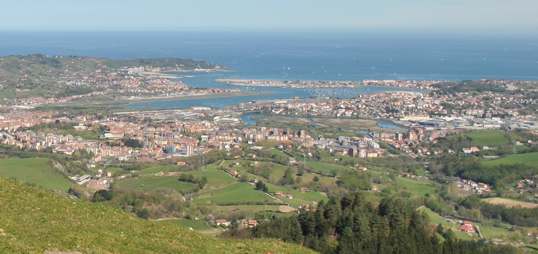 Bahía de Txingudi desde Aiako Harria This is a photography of a Special Area of Conservation in Spain with the ID: ES2120018. Natura2000 entry, EEA entry